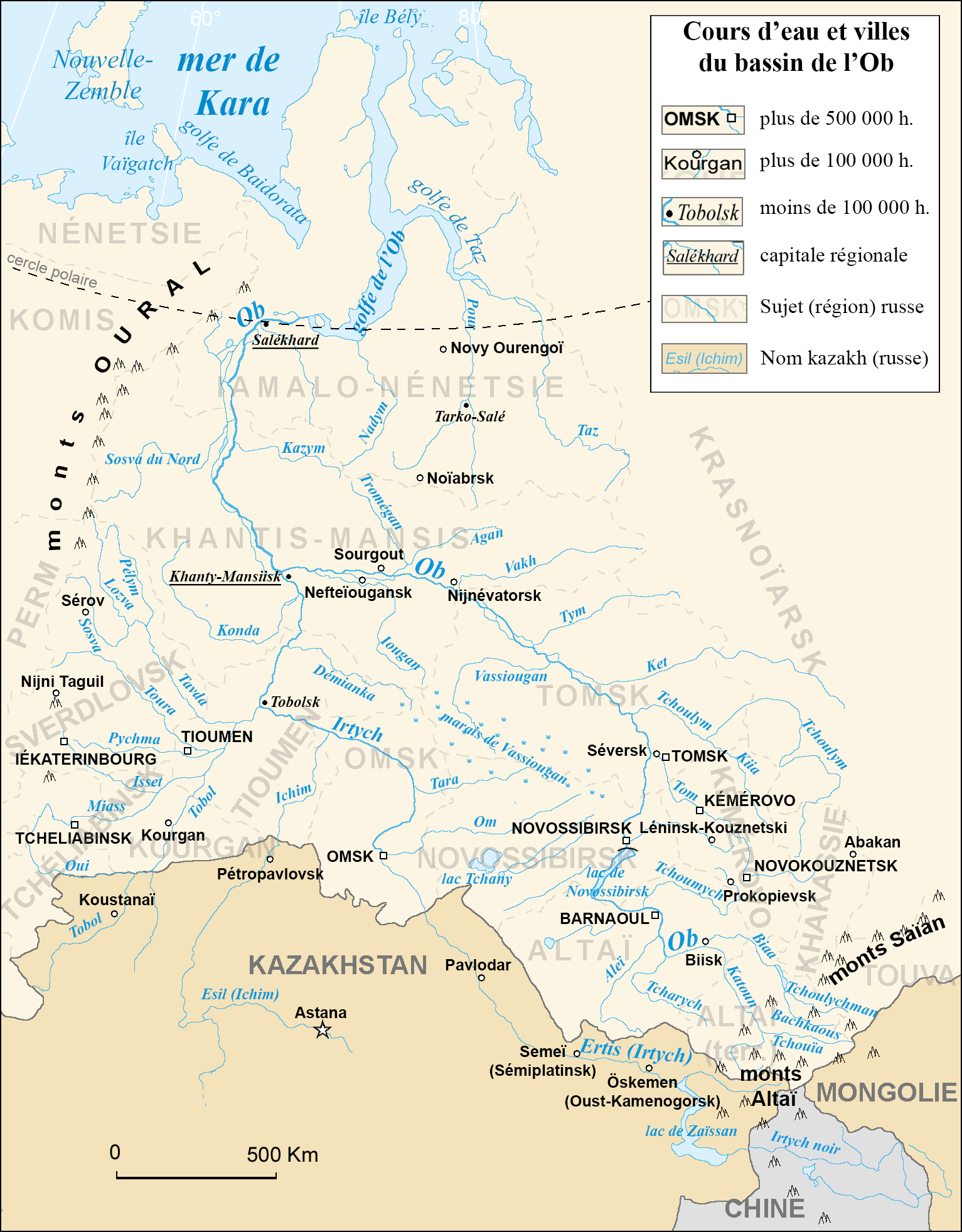 Bassin fluvial de l'Ob, Russie